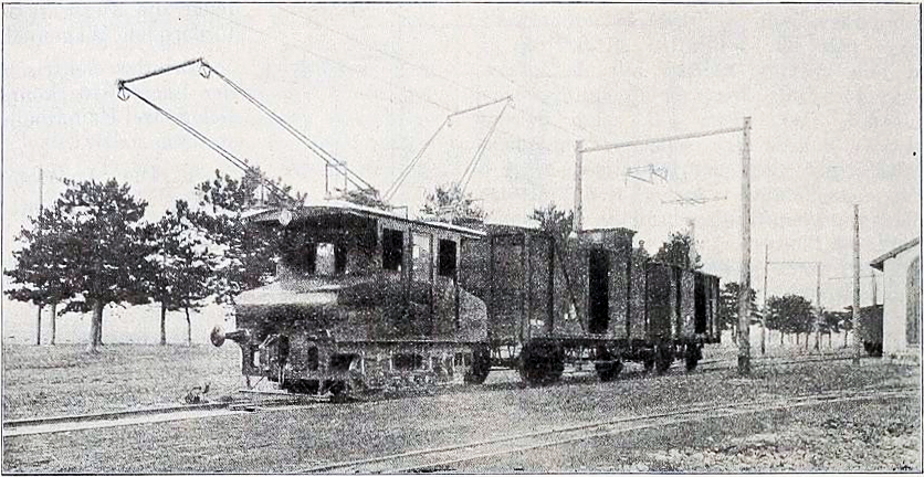 Wöllersdorf, Niederösterreich, Munitionsfabrik, Werksbahn